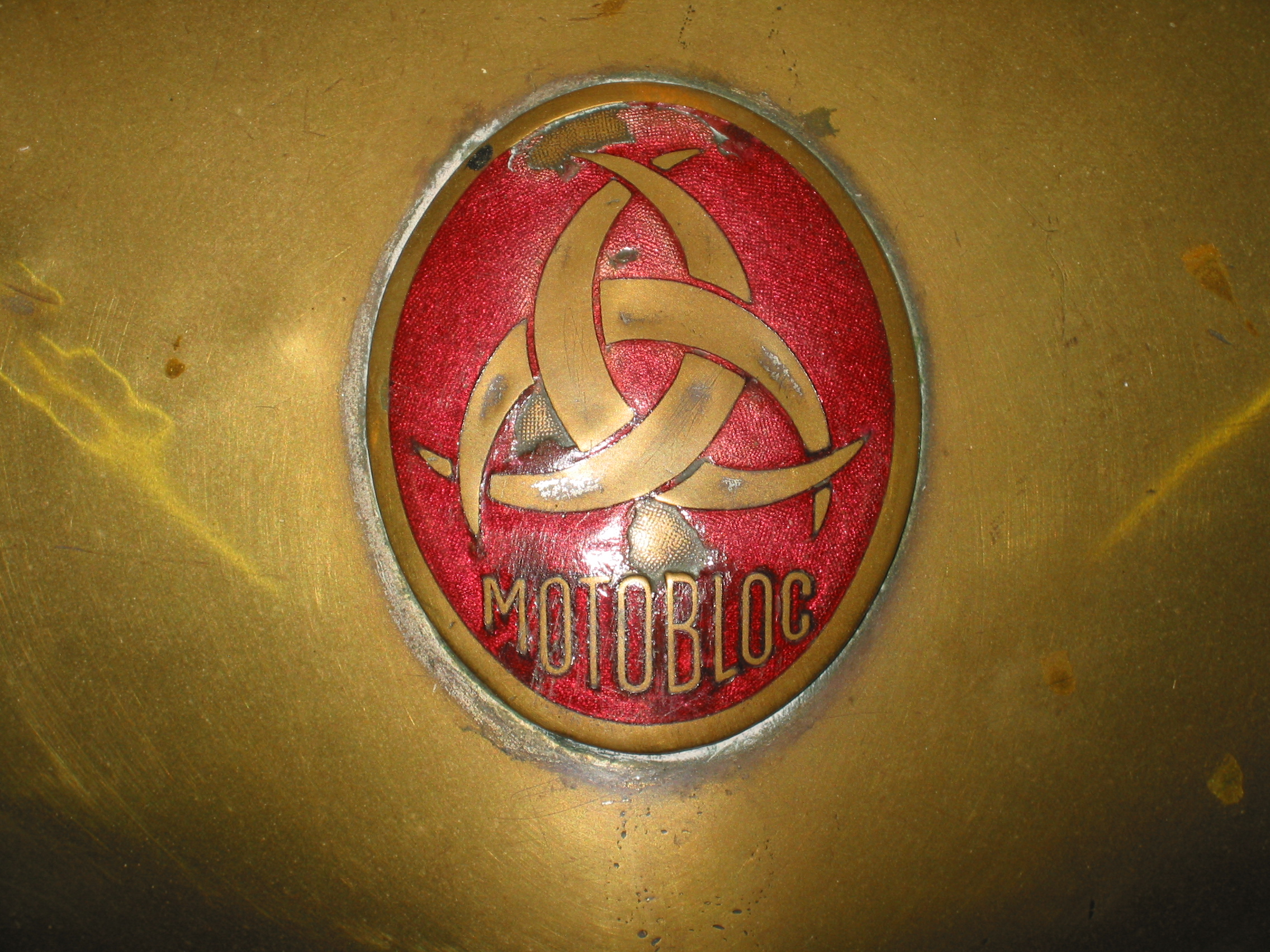 Emblem Motobloc 1925